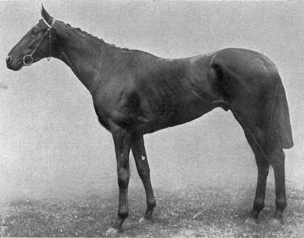 1913 St. Leger winner Night Hawk.